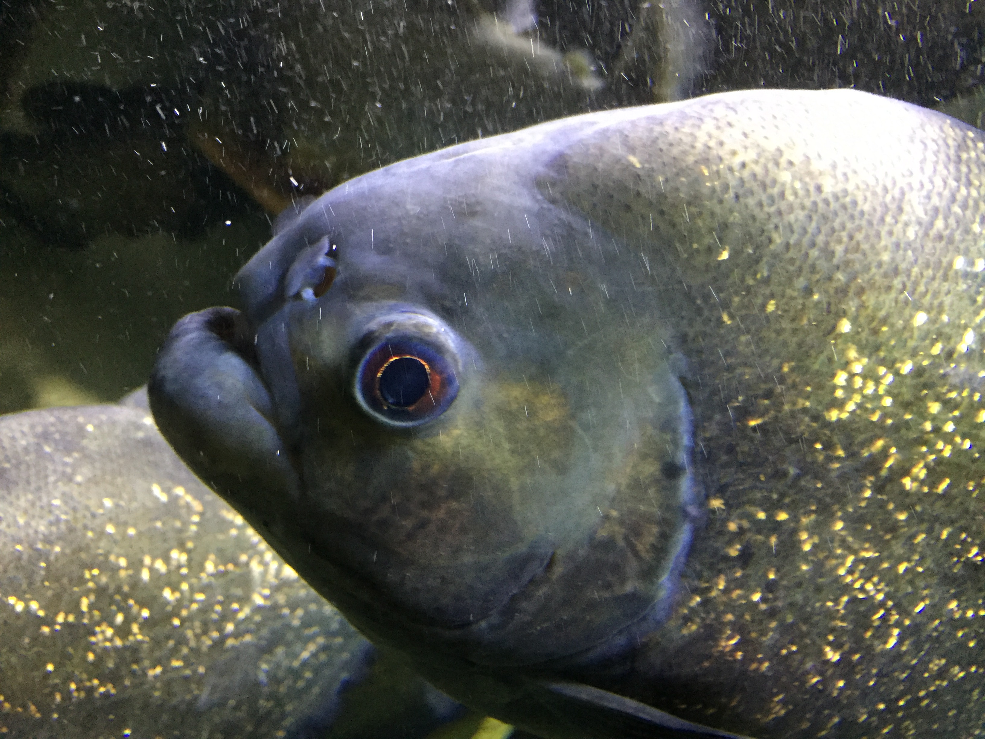 Cabeza de piraña (Pygocentrus nattereri) en en el parque Pairi Daiza (Brugelette, Bélgica).